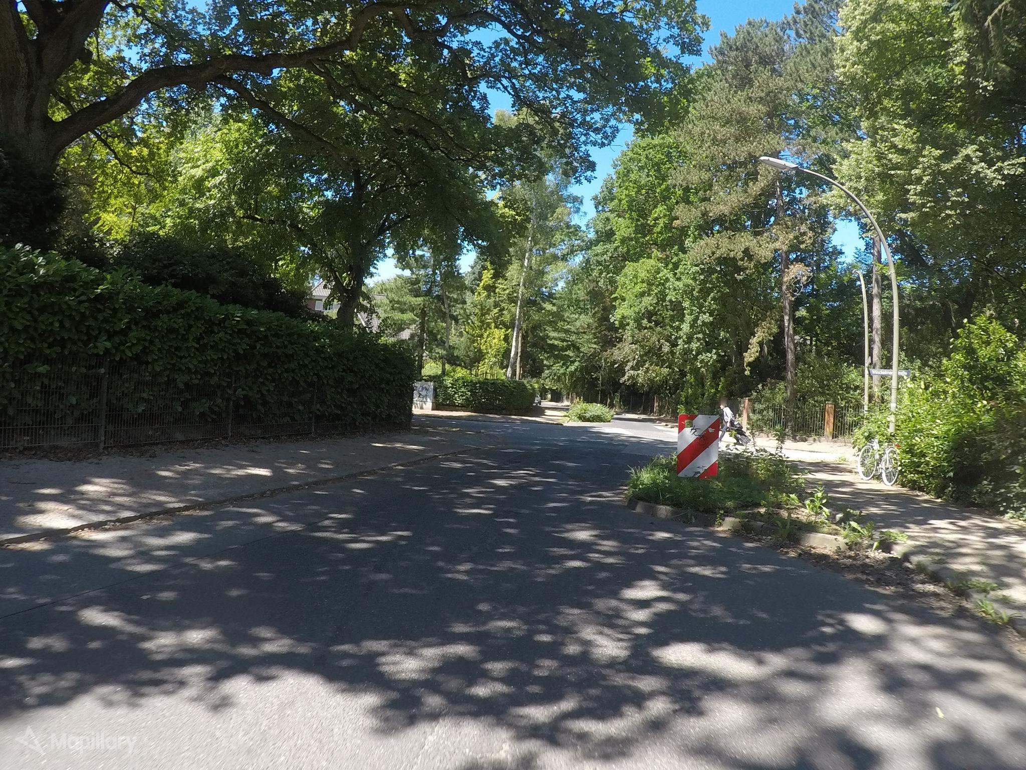 Humannstraße in Hamburg-Nienstedten